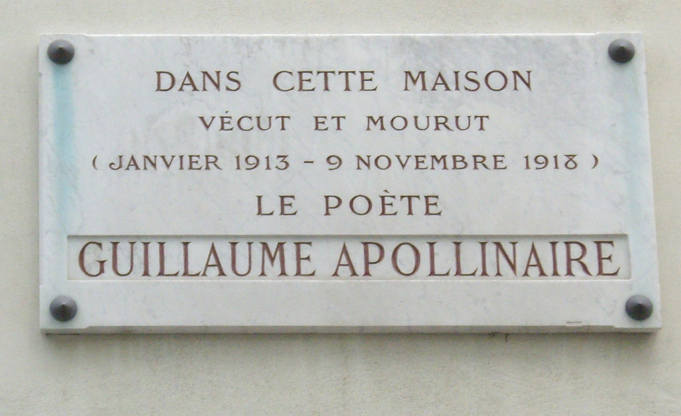 Plaque apposée au n° 202 du boulevard Saint-Germain, Paris 7e, où vécut le poète Guillaume Apollinaire (1880-1918) de janvier 1913 à sa mort le 9 novembre 1918.